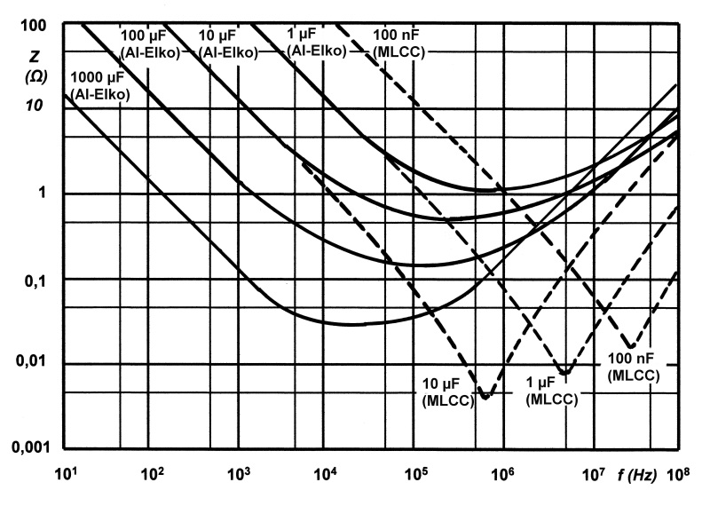 Impedanzkurven verschiedener Kapazitätswerte aus unterschiedlichen Kondensatorfamilien